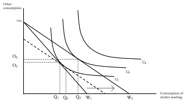 Effetto rebound diretto e indiretto